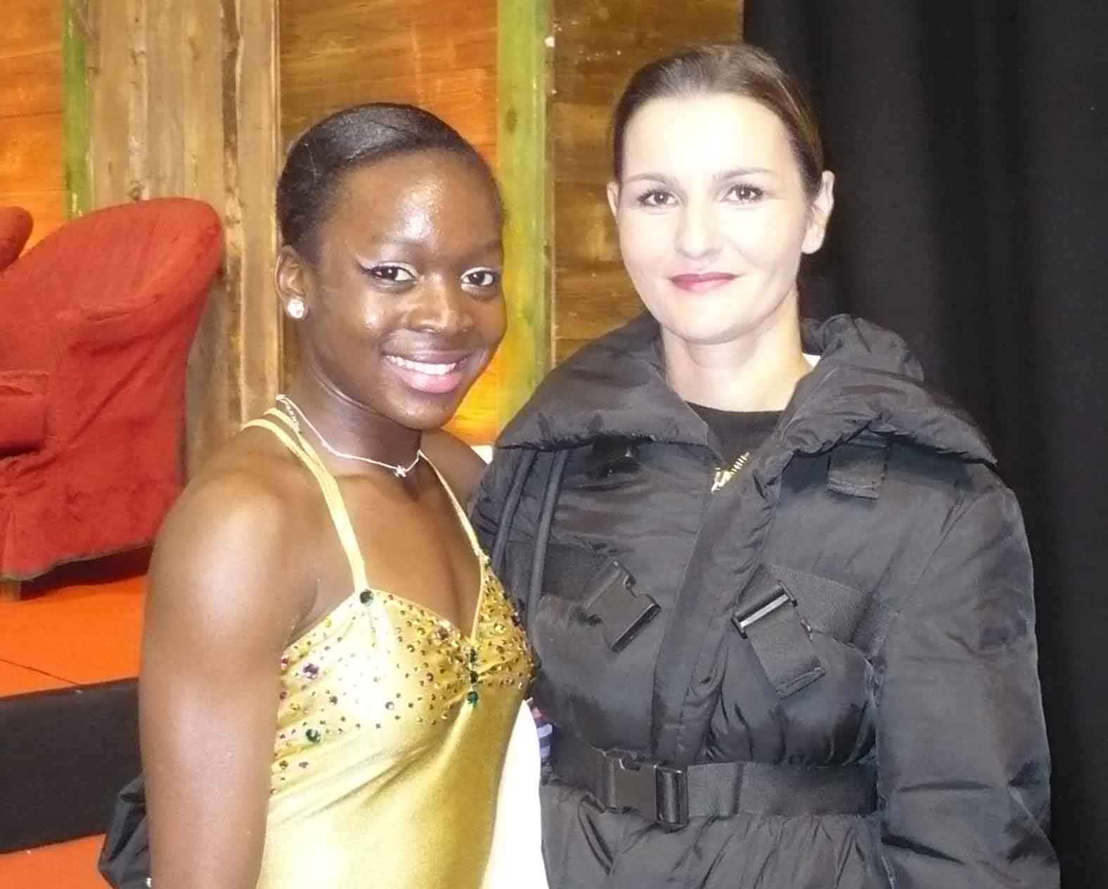 JGP Courchevel 2010